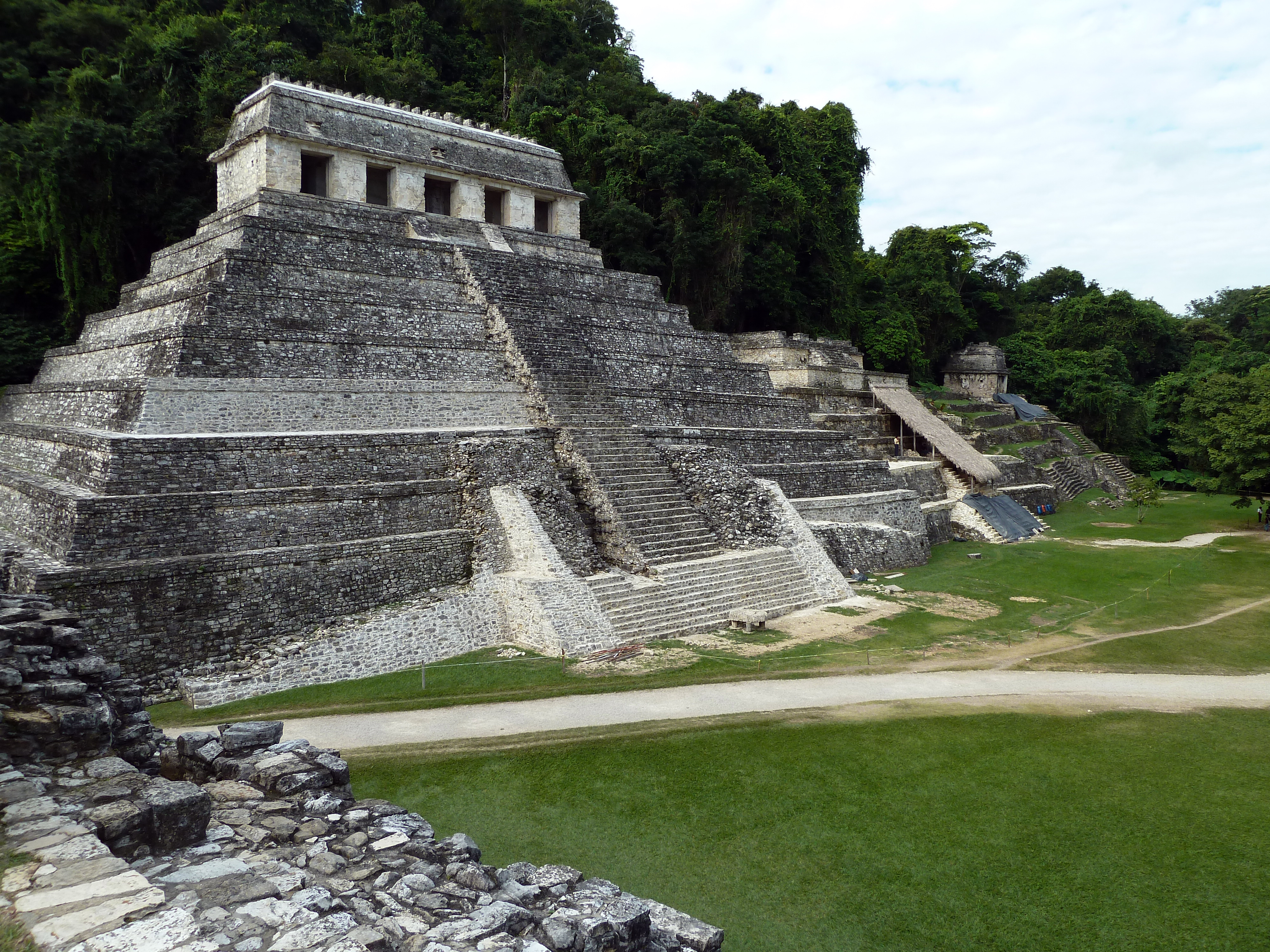 Day 9: Palenque